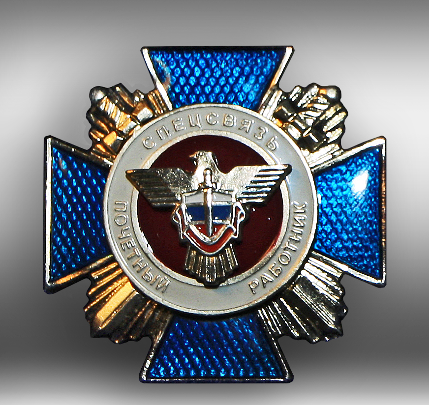 Hагрудный знак почётных работников ГЦСС (Главный центр специальной связи - Спецсвязь России).